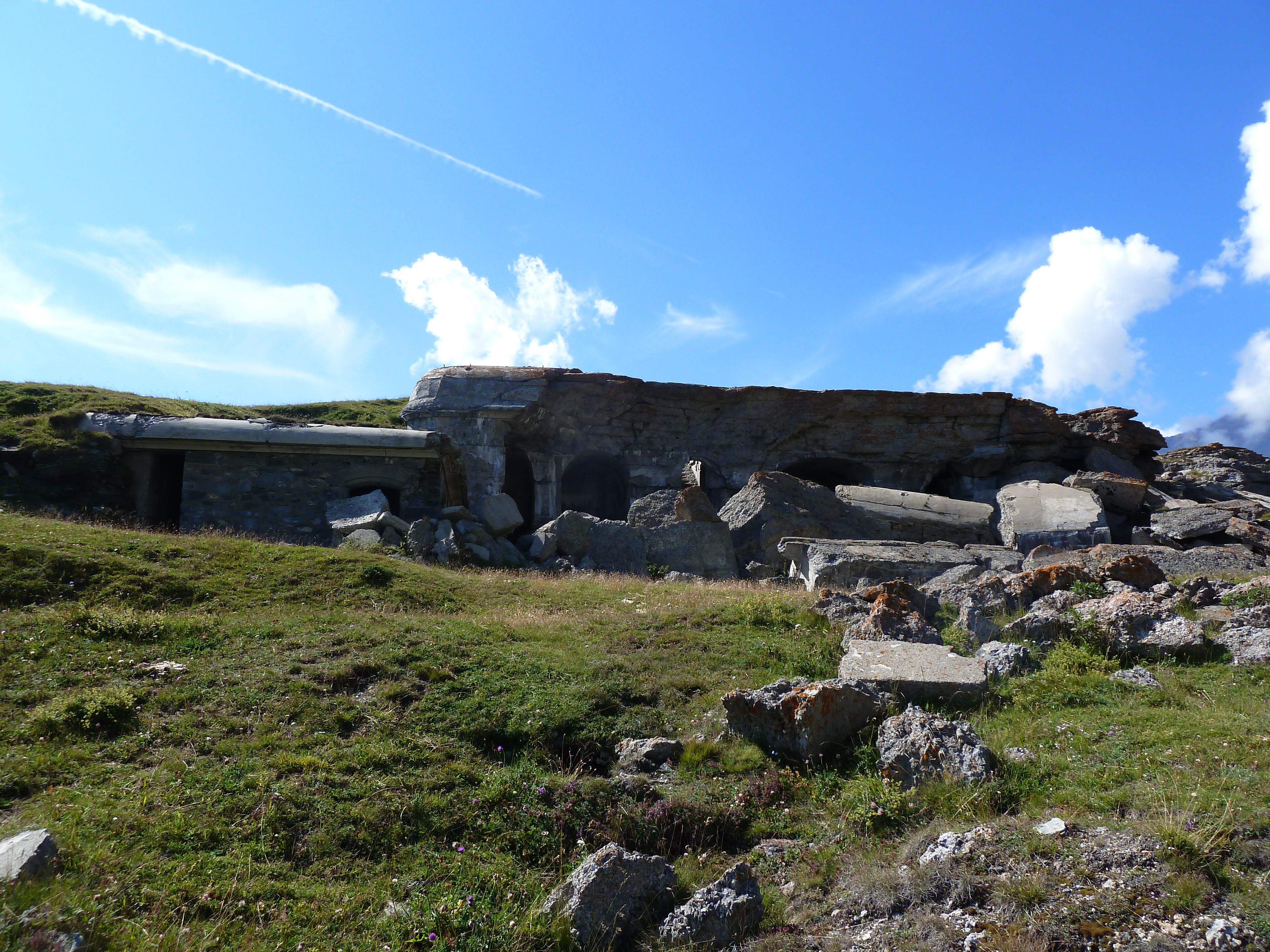 Veduta delle rovine della Batteria La Court